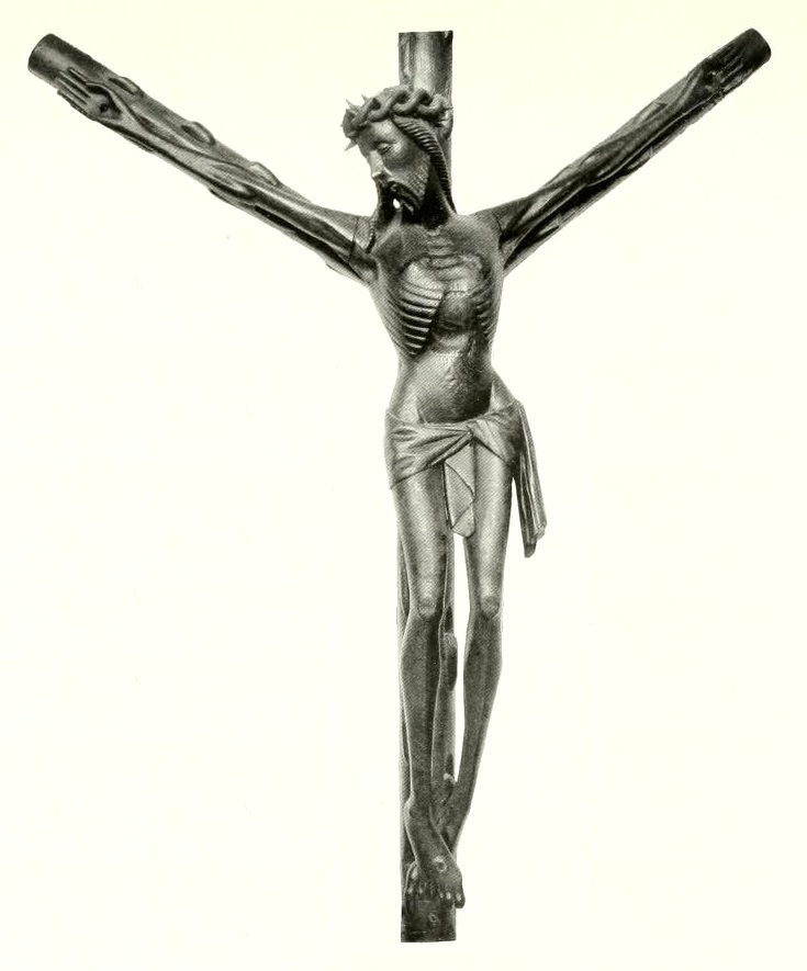 Gotisches Gabelkreuz in Darfeld, St. Nikolaus